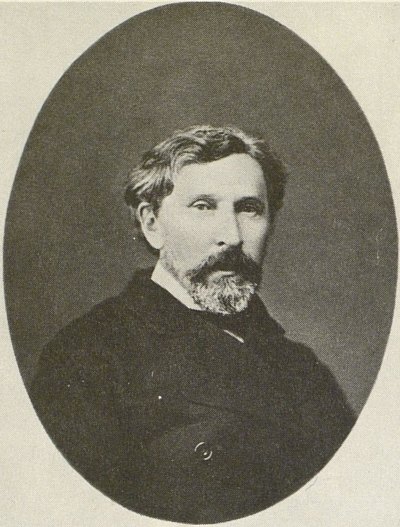 К.А. Трутовский. Придворная фотография М. Настюкова в Москве. ИРЛИ. Санкт-Петербург.